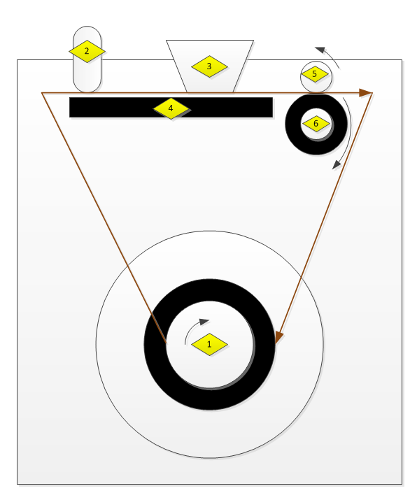 Esquema de funcionamento de um cartucho de áudio